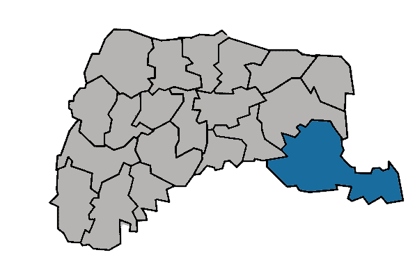 台灣省雲林縣古坑鄉 為編輯雲林縣zh:古坑鄉繪製--ＫＪ 07:21 2005年1月23日 (UTC)